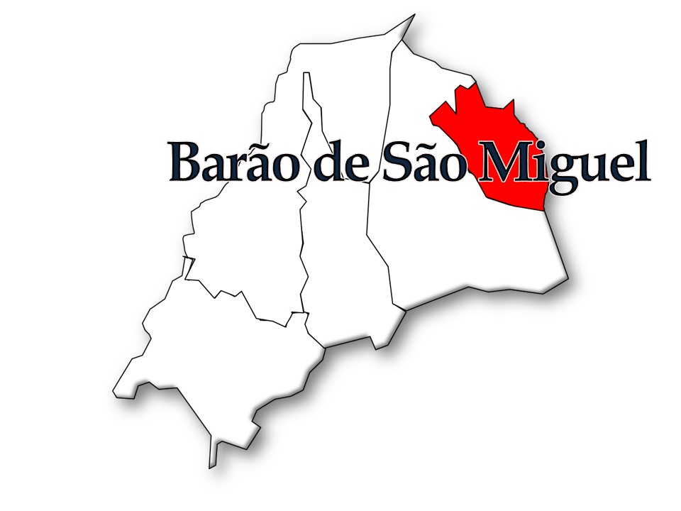 Censos 1864/2011